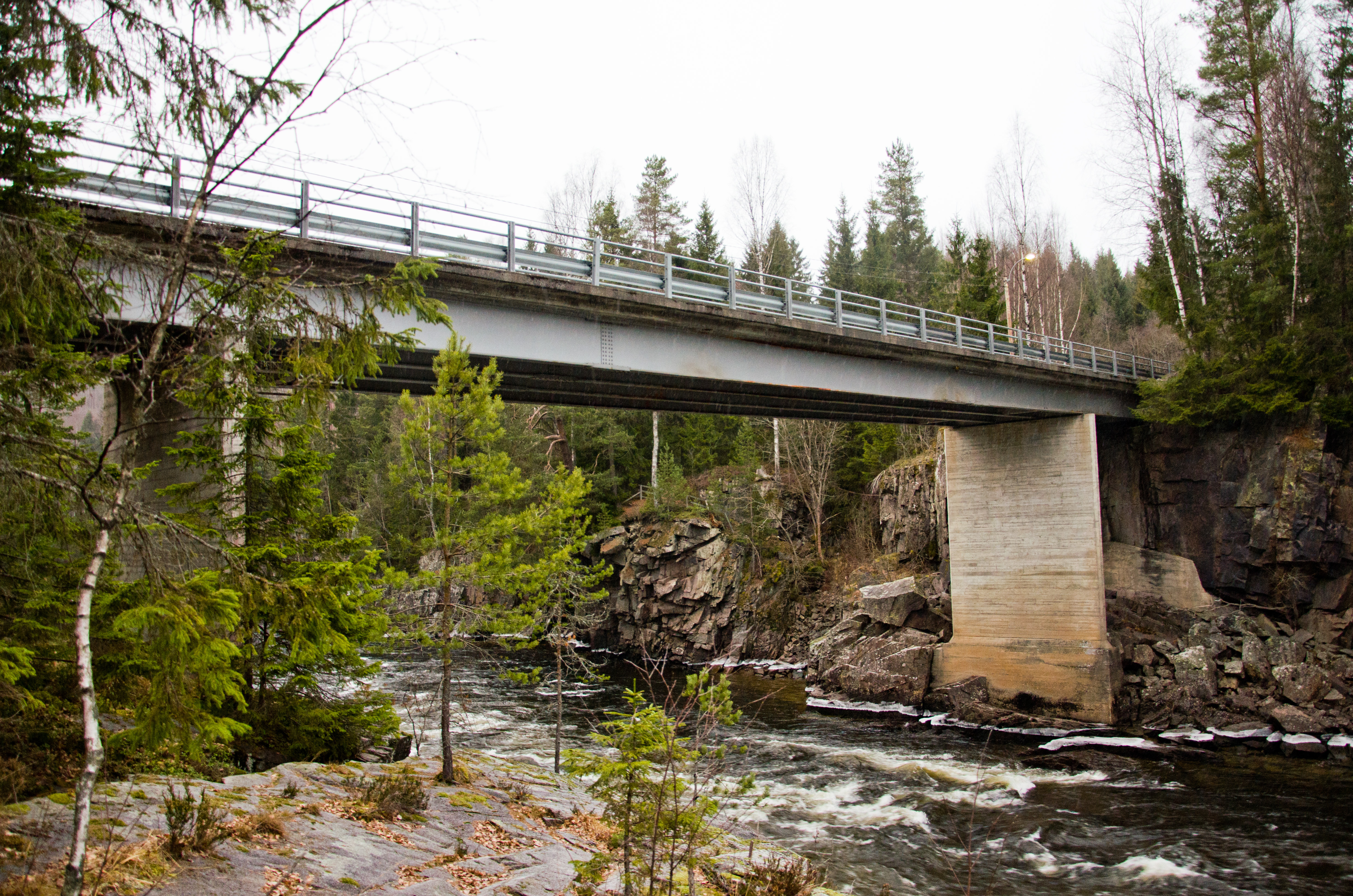 Brufossbru over Lågen i Brufoss, Lardal, Vestfold